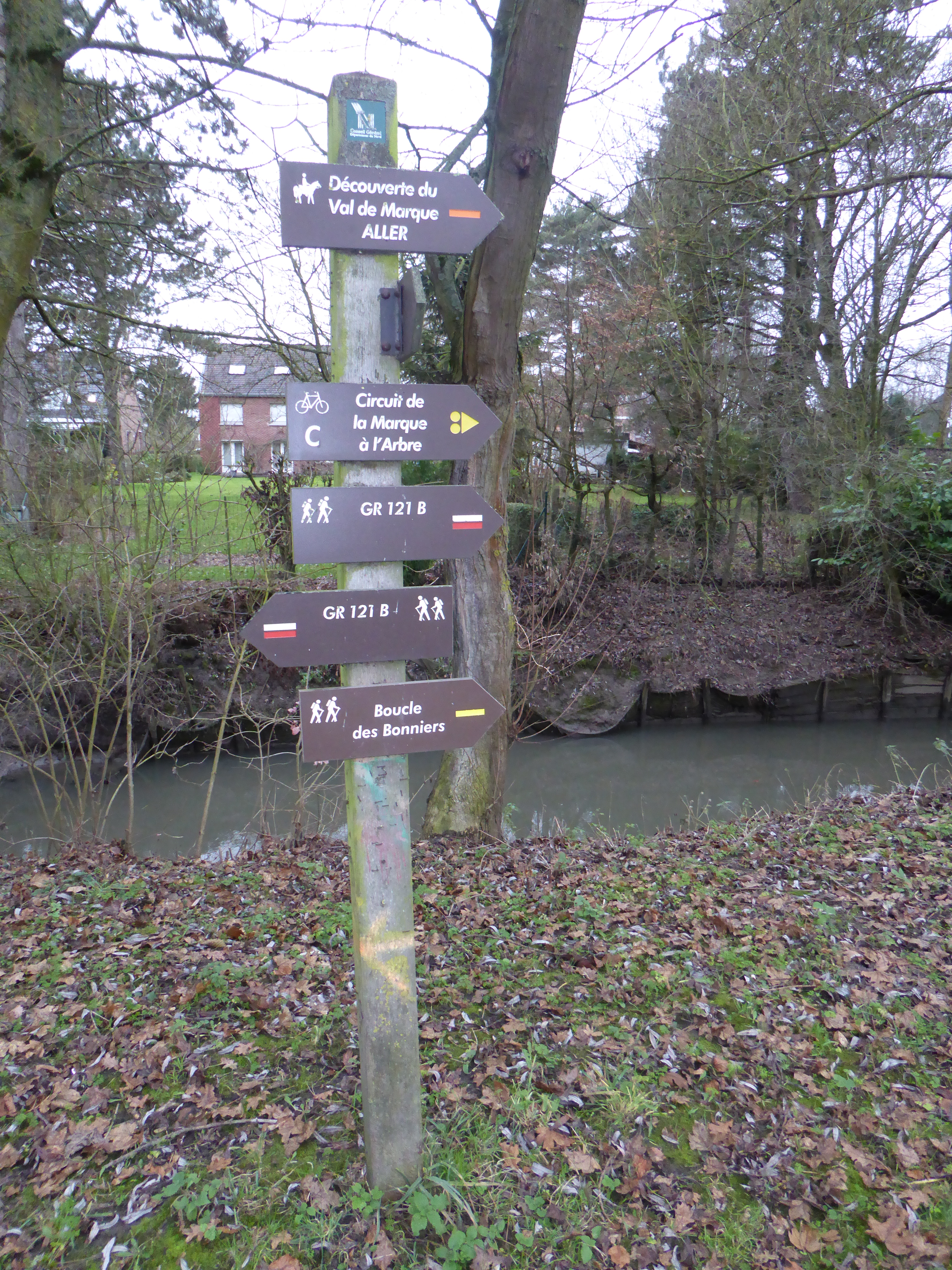 Le GR 121B dans la base loisirs des 6 Bonniers Willems dans le Nord Nord-Pas-de-Calais.- France.